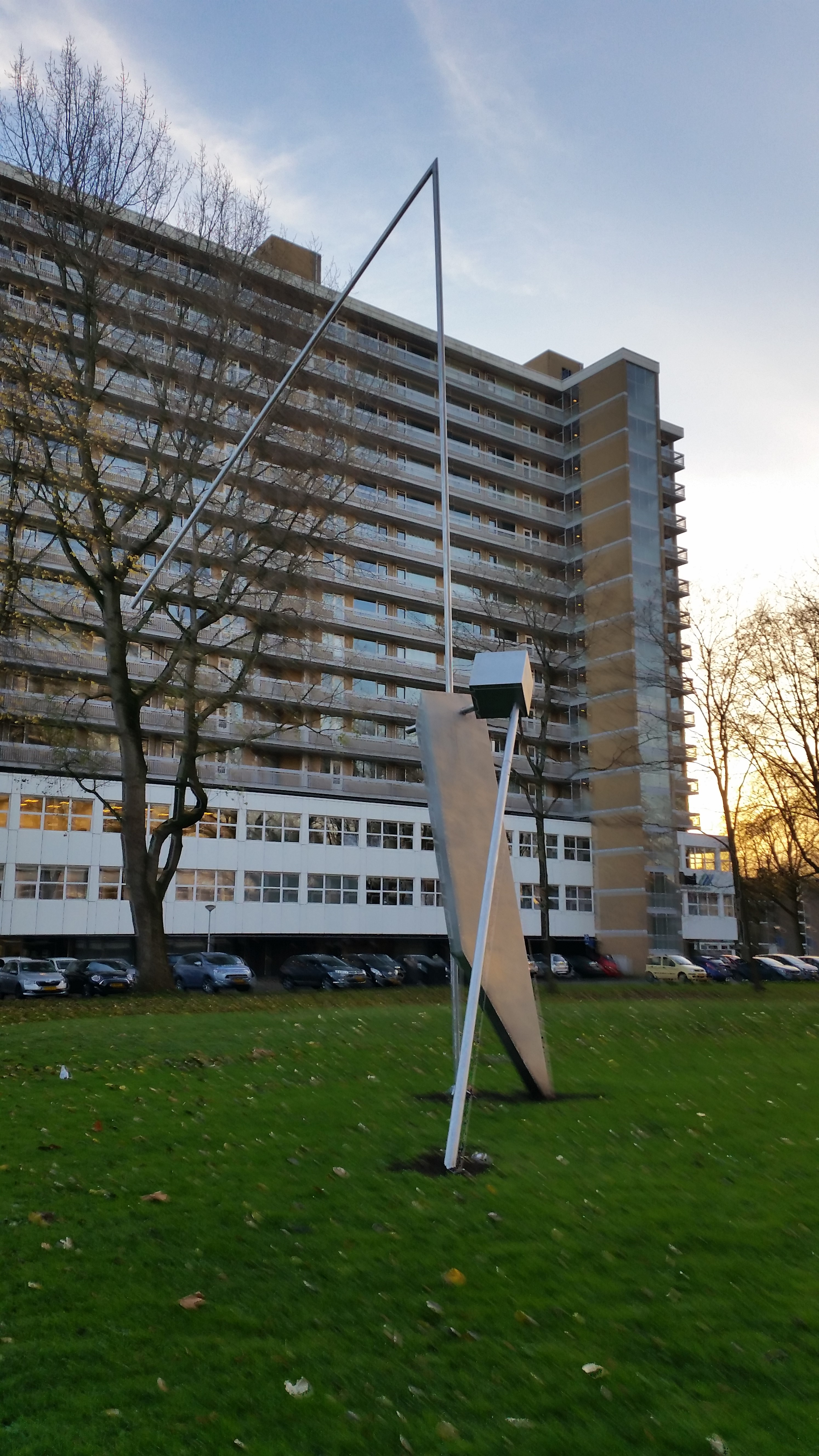 Zonder titel (Eugène van Lamsweerde, Amsterdam)